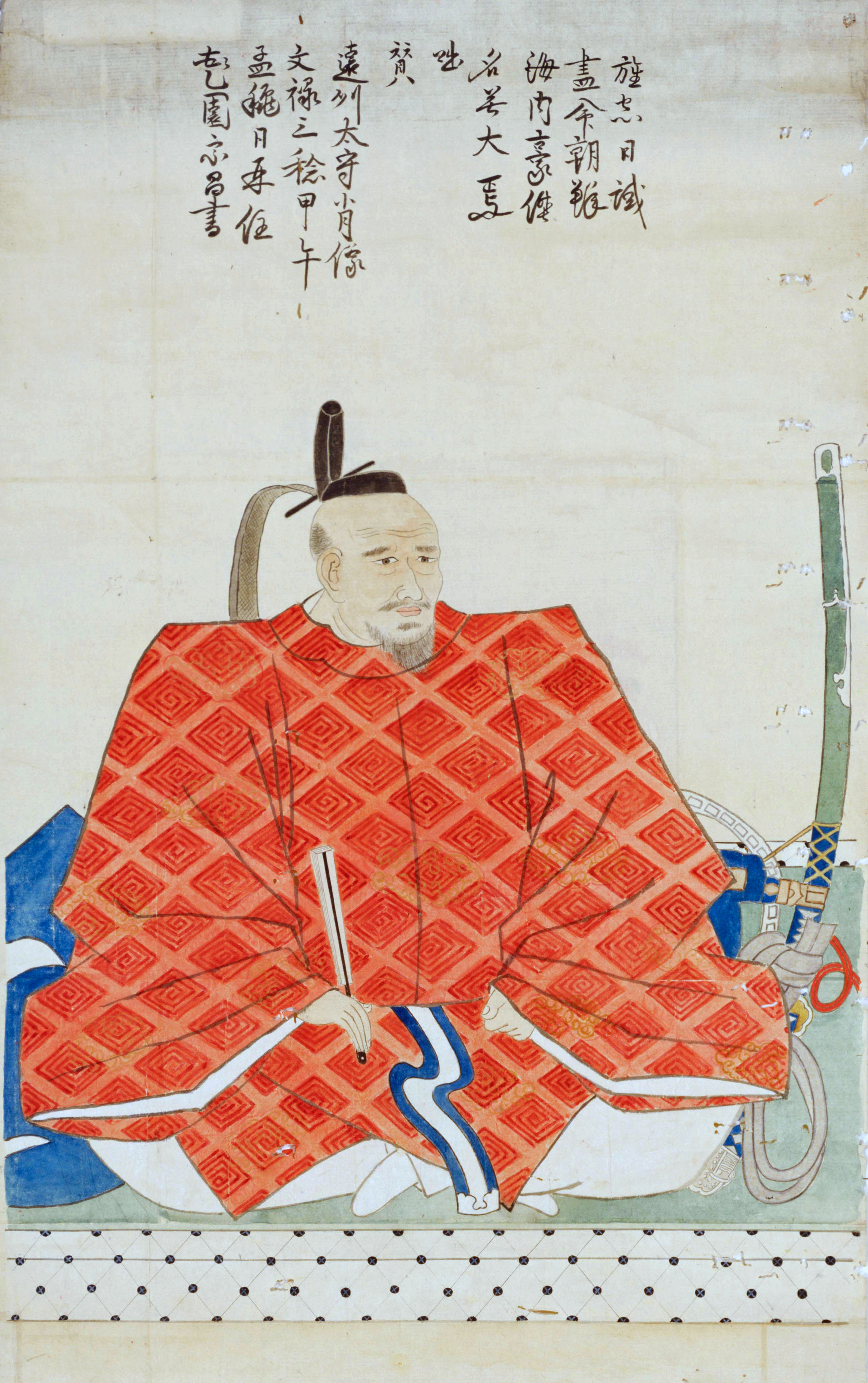 加藤光泰像（個人蔵・竹中元彦氏）。宗昌賛 旌忠日誠 盡命朝鮮 海内豪□（傑カ） 名□大焉 咄 賛 遠州太守肖像 文禄三稔甲午 孟穐日再住 花園宗昌書